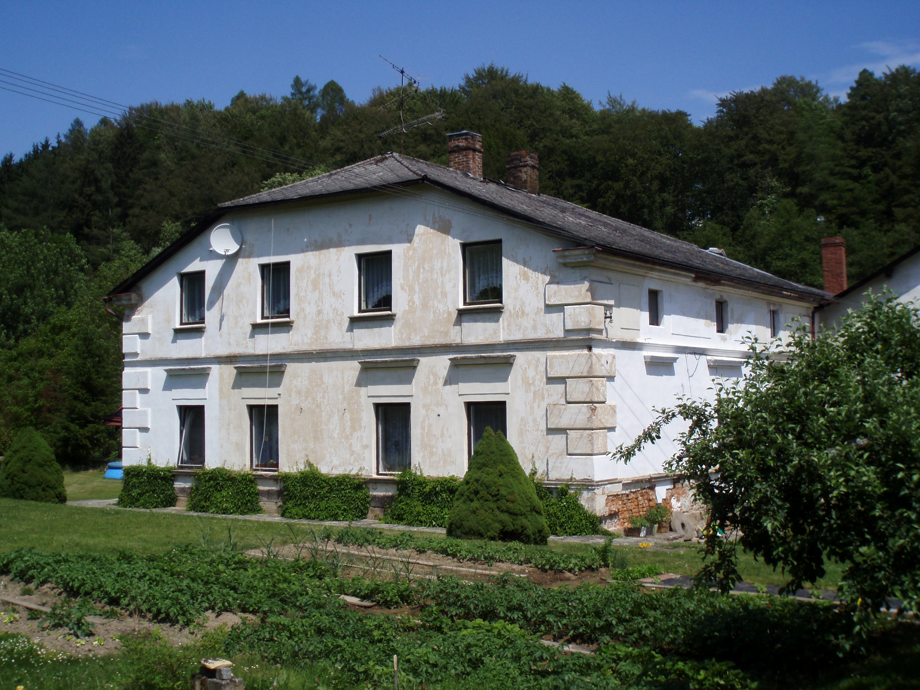 Slatinský mlýn